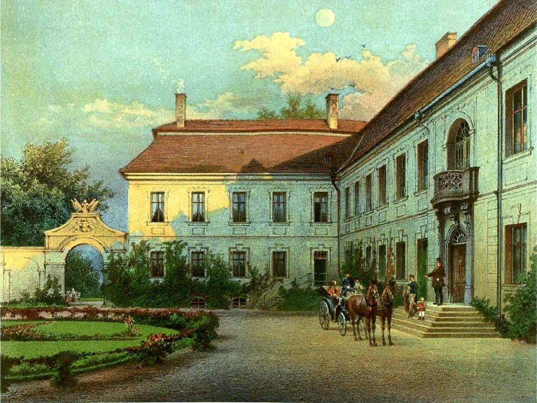 Schloss Löwen